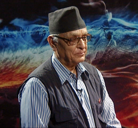 नेपाली: Prakashchandra Lohani, Nepali